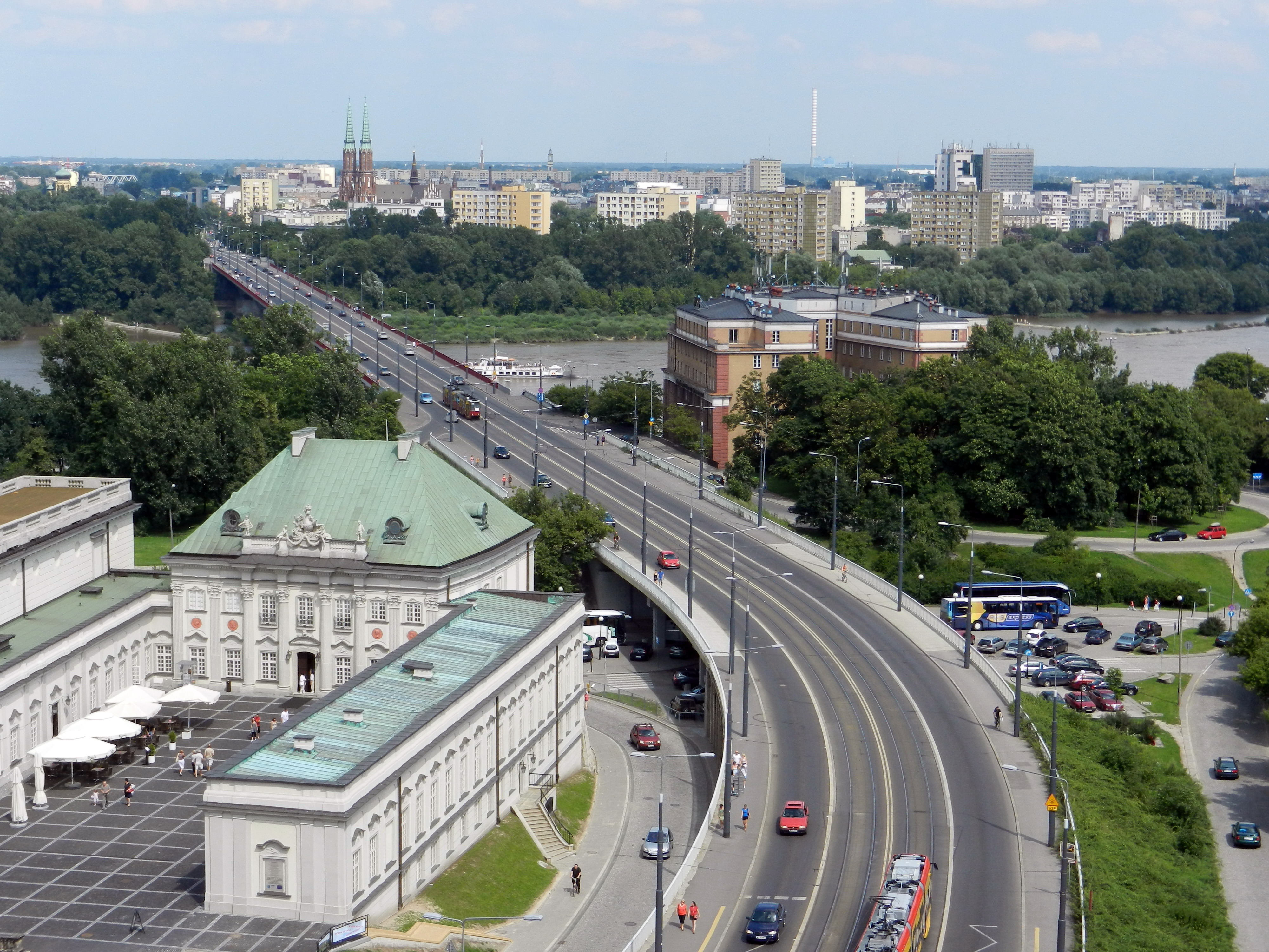 Most Śląsko-Dąbrowski.